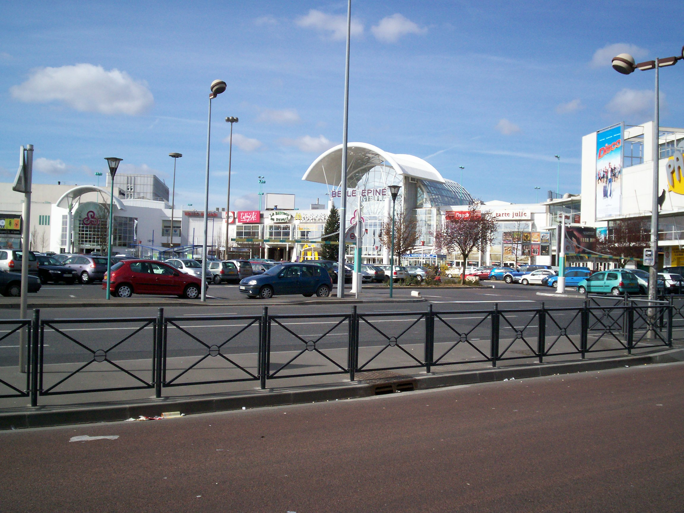 Vue du centre commercial Belle Epine depuis l'arrêt du même nom